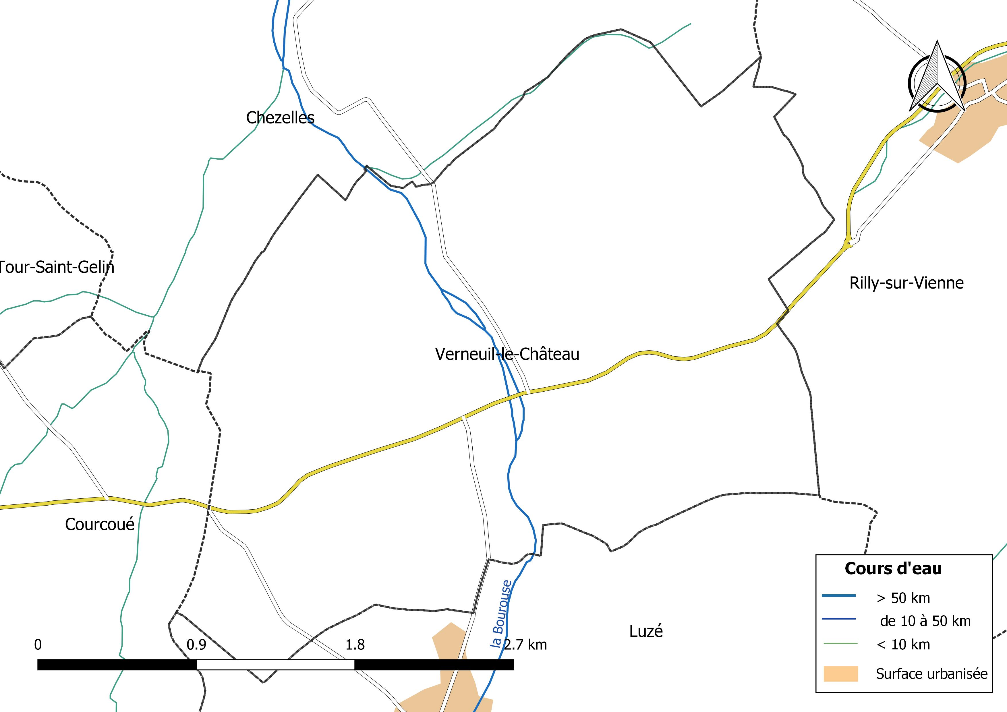 Carte du réseau hydrographique de la commune de Verneuil-le-Château (France).